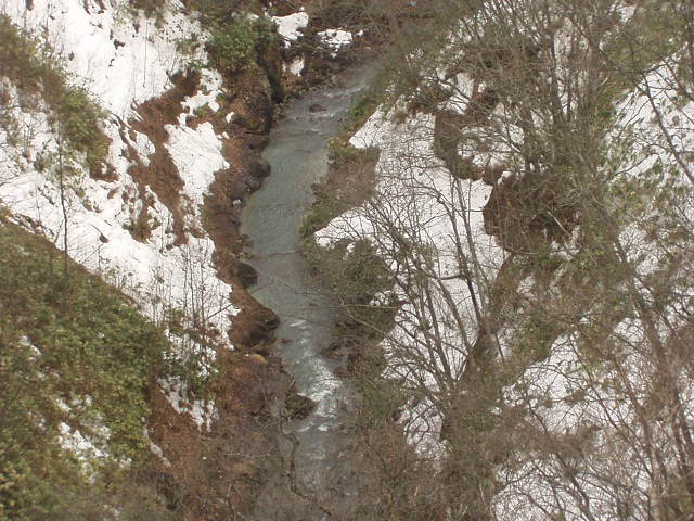 Kusurisanbetsu River. Noboribetsu, Hokkaidō prefecture, Japan.